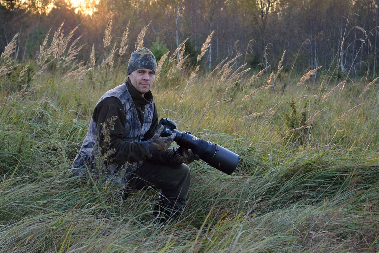 Eesti fotograaf Erik Mandre.